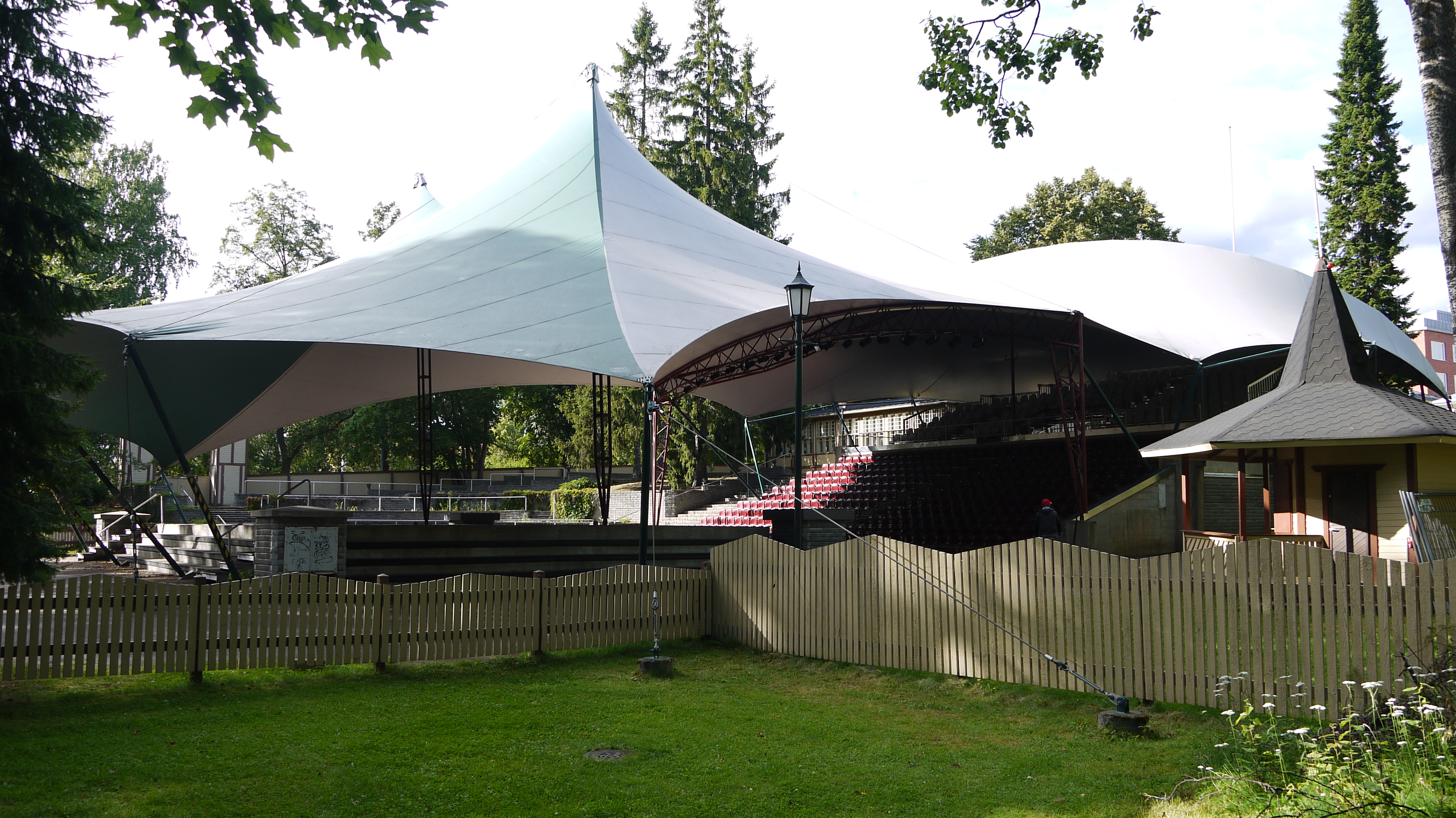 Heinolan kesäteatterin tyhjä esiintemislava ja katsomo